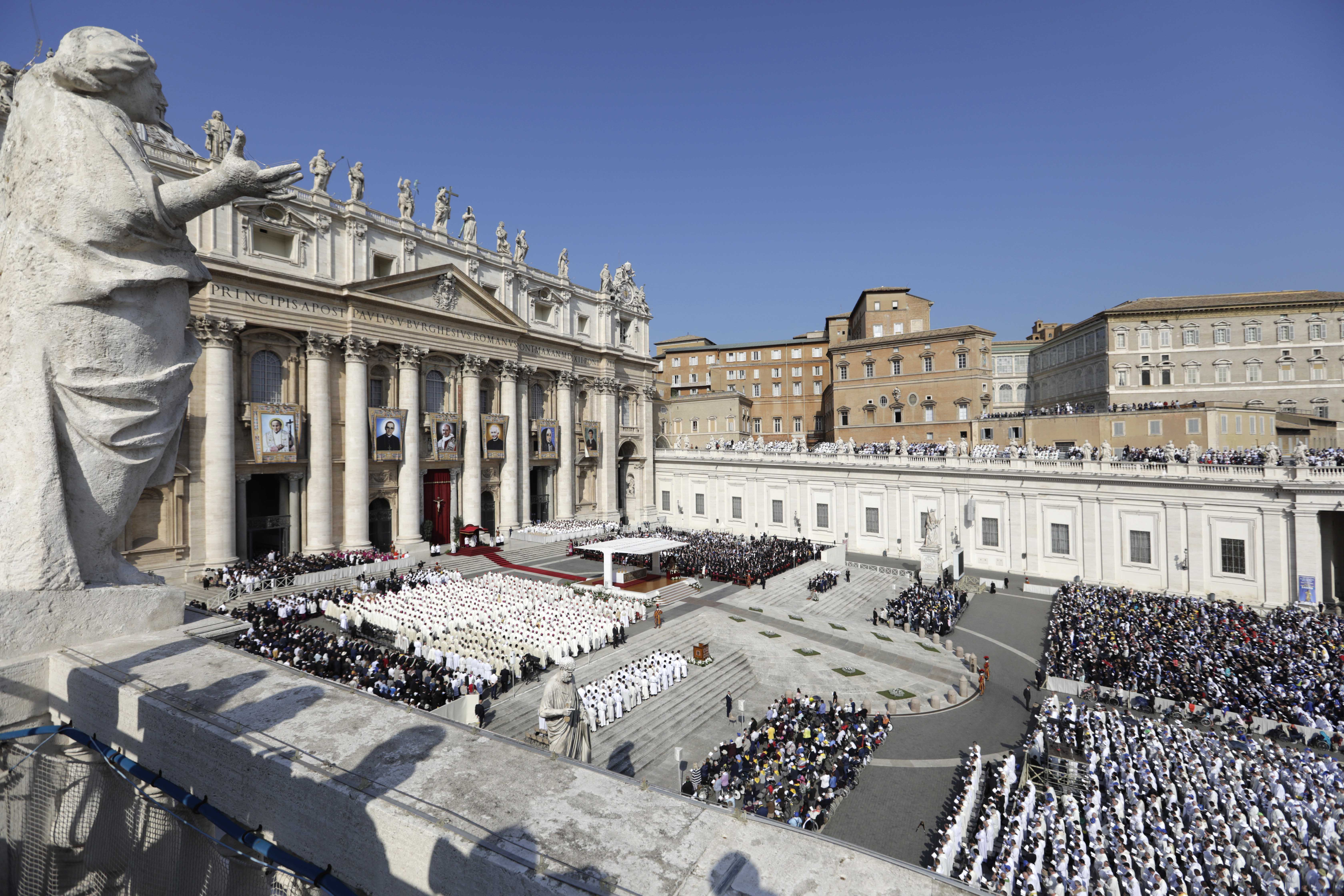 Ceremonia de Canonización de Monseñor Romero.